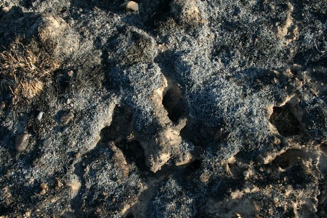 Madrigueras de topillo (Microtus arvalis asturianus) en un rastrojo quemado